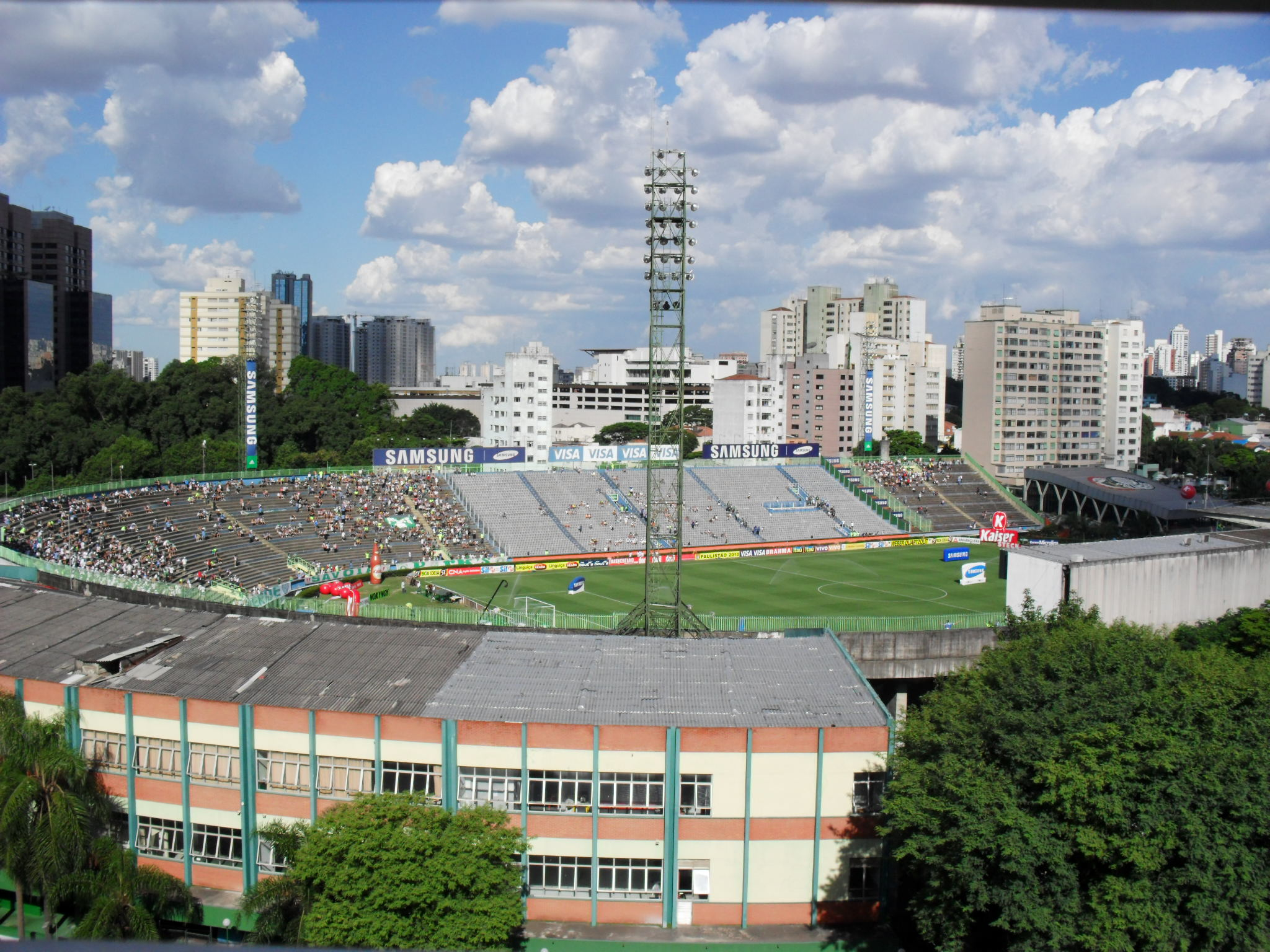 Vista de Fora do Estádio Palestra Itália e de Outras Acomodações da Sociedade Esportiva Palmeiras